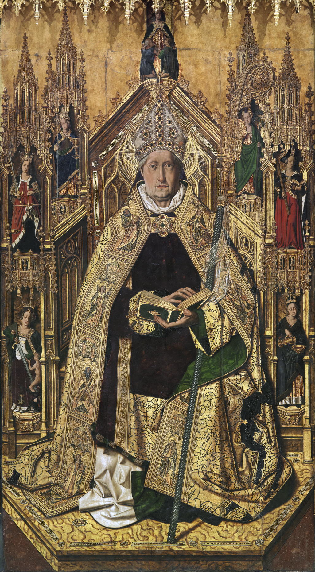 La obra representa a Santo Domingo de Silos entronizado como obispo, y es la tabla central del retablo de Santo Domingo de Silos de la parroquia de Daroca, en la provincia de Zaragoza. El santo aparece vestido de obispo y sentado en un trono gótico decorado con estatuas policromadas de las siete virtudes, las teologales: Fe, Esperanza y Caridad y las cardinales: Prudencia, Justicia, Fortaleza y Templanza. Destaca especialmente el extremo realismo del rostro de Santo Domingo y la fuerza de su mirada, características propias del arte flamenco que, en este caso, no son verídicas sino ideales, ya que fue en el siglo XI cuando el monje Domingo fundó, cerca de Burgos, el Monasterio de Silos, donde vivió. Este realismo contrasta con el abundante uso del oro que, como se había especificado en el contrato, no aparece embutido, como es habitual en Aragón.